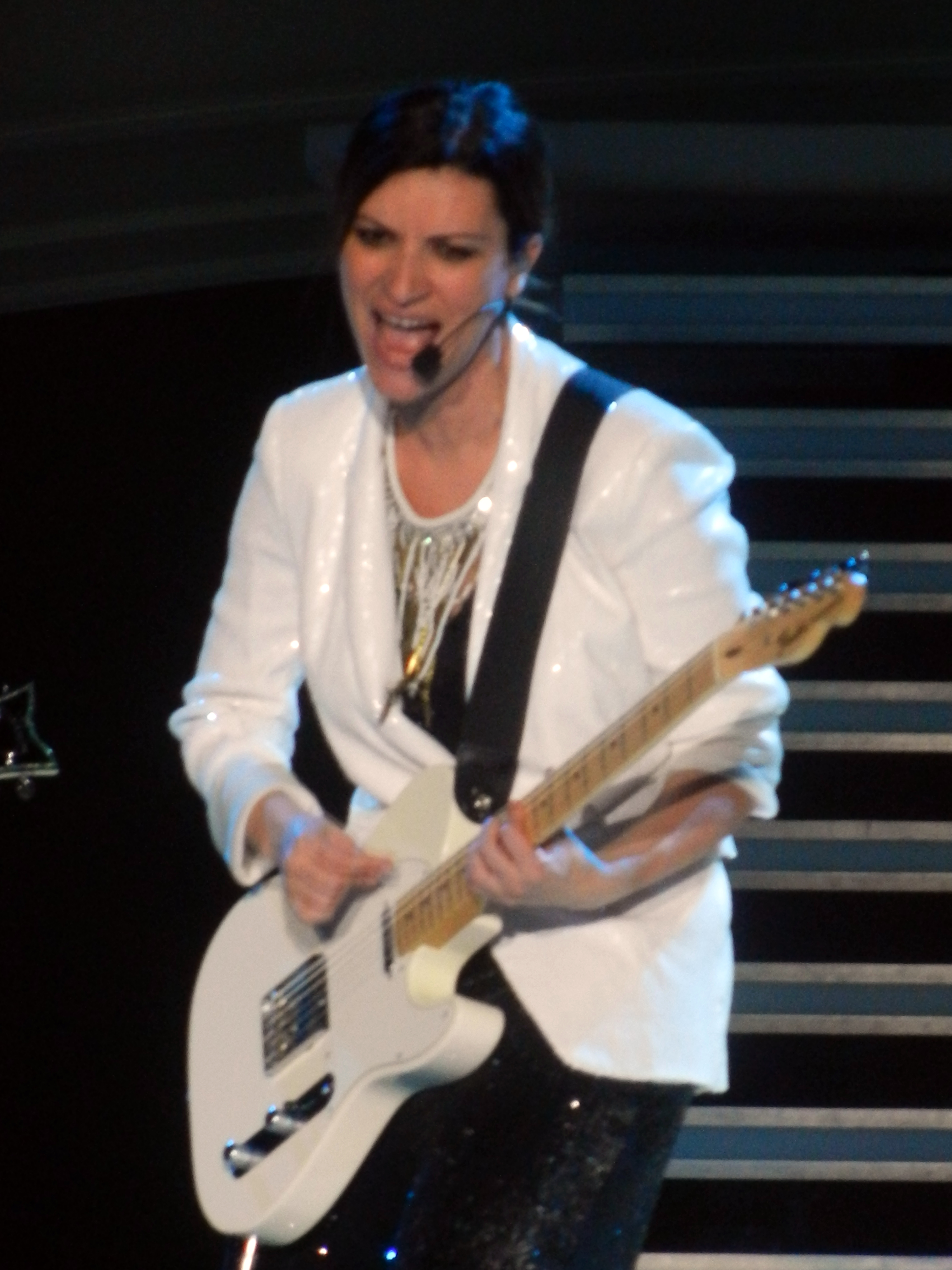 Laura Pausini 09 - Bercy - Avril 2012